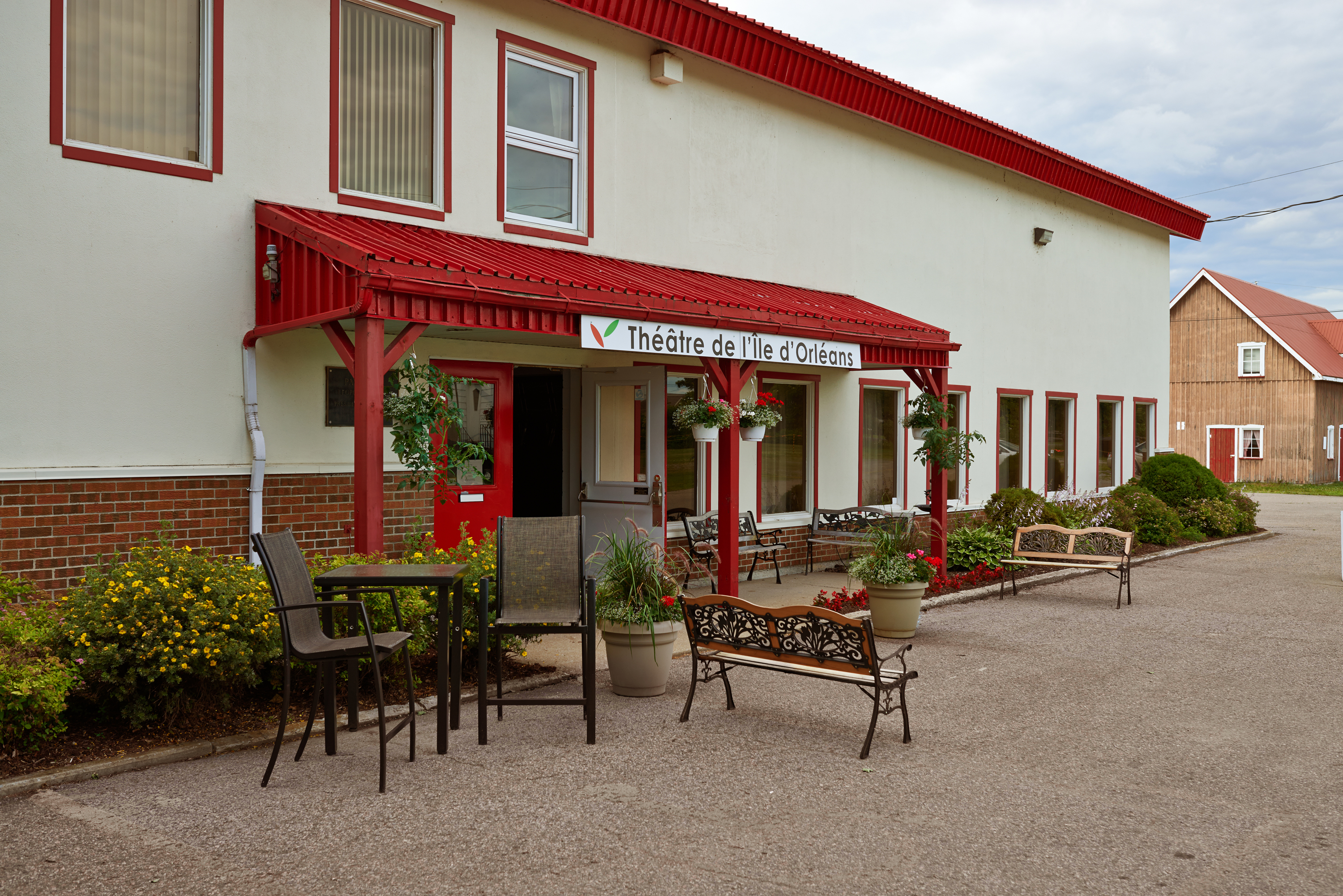 Bâtiments qui existe depuis ..